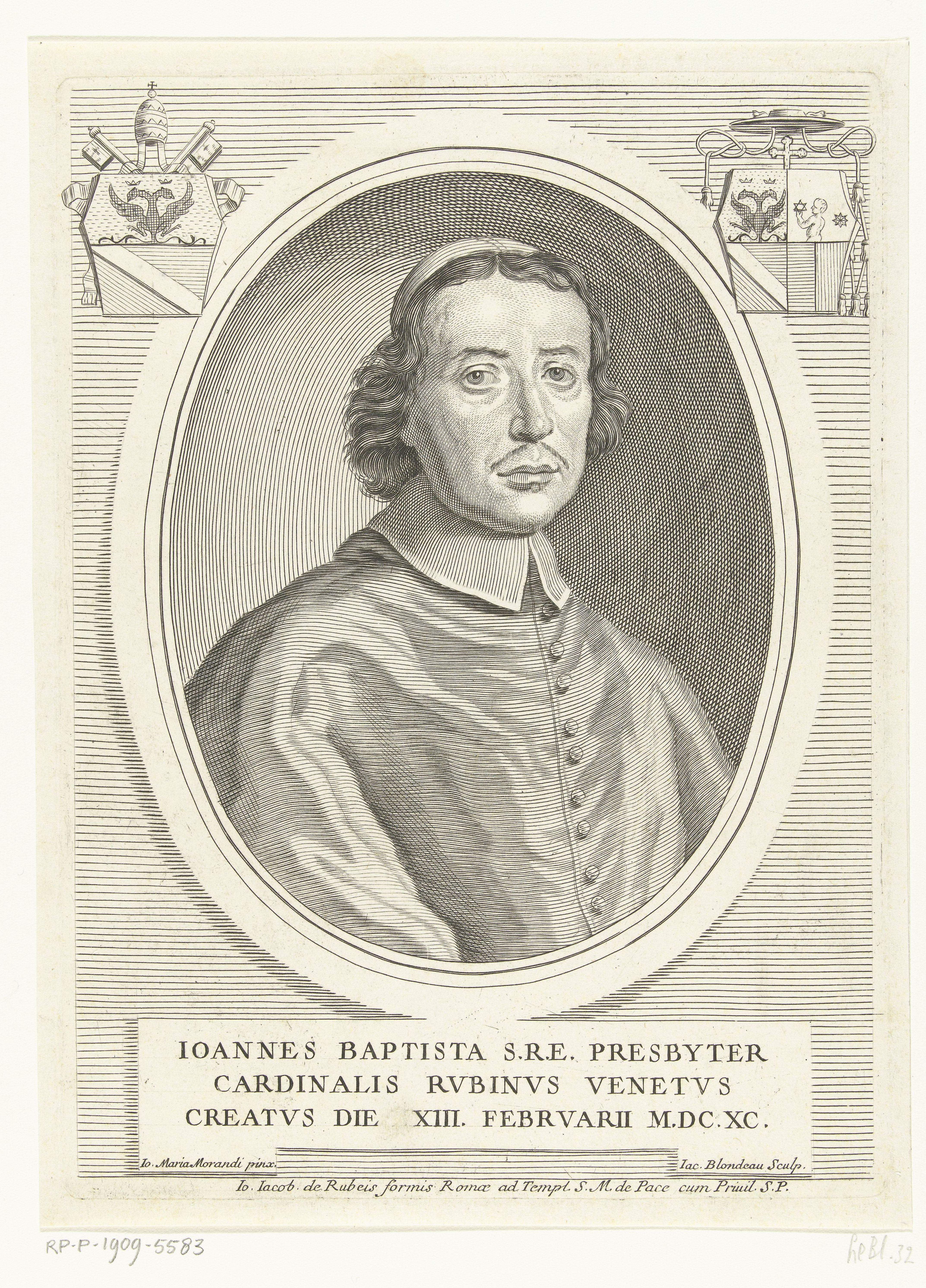 IdentificatieTitel(s): Portret van kardinaal Giambattista RubiniIoannes Baptista S.R.E. (...) die XIII febrvarii MDCXC (titel op object)Objecttype: prent Objectnummer: RP-P-1909-5583Catalogusreferentie: LeBlanc 32Opschriften / Merken: verzamelaarsmerk, verso midden, gestempeld: Lugt 2228VervaardigingVervaardiger: prentmaker: Jacques Blondeau (vermeld op object)naar schilderij van: Giovanni Maria Morandi (vermeld op object)uitgever: Giovanni Giacomo de'Rossi (vermeld op object)Plaats vervaardiging: prentmaker: onbekenduitgever: RomeDatering: 1690 - 1698Fysieke kenmerken: gravureMateriaal: papier Techniek: graveren (drukprocedé)Afmetingen: plaatrand: h 211 mm × b 155 mmToelichtingPrent naar schilderij van Giovanni Maria Morandi.OnderwerpWie: Giambattista RubiniVerwerving en rechtenVerwerving: aankoop 1905Copyright: Publiek domein